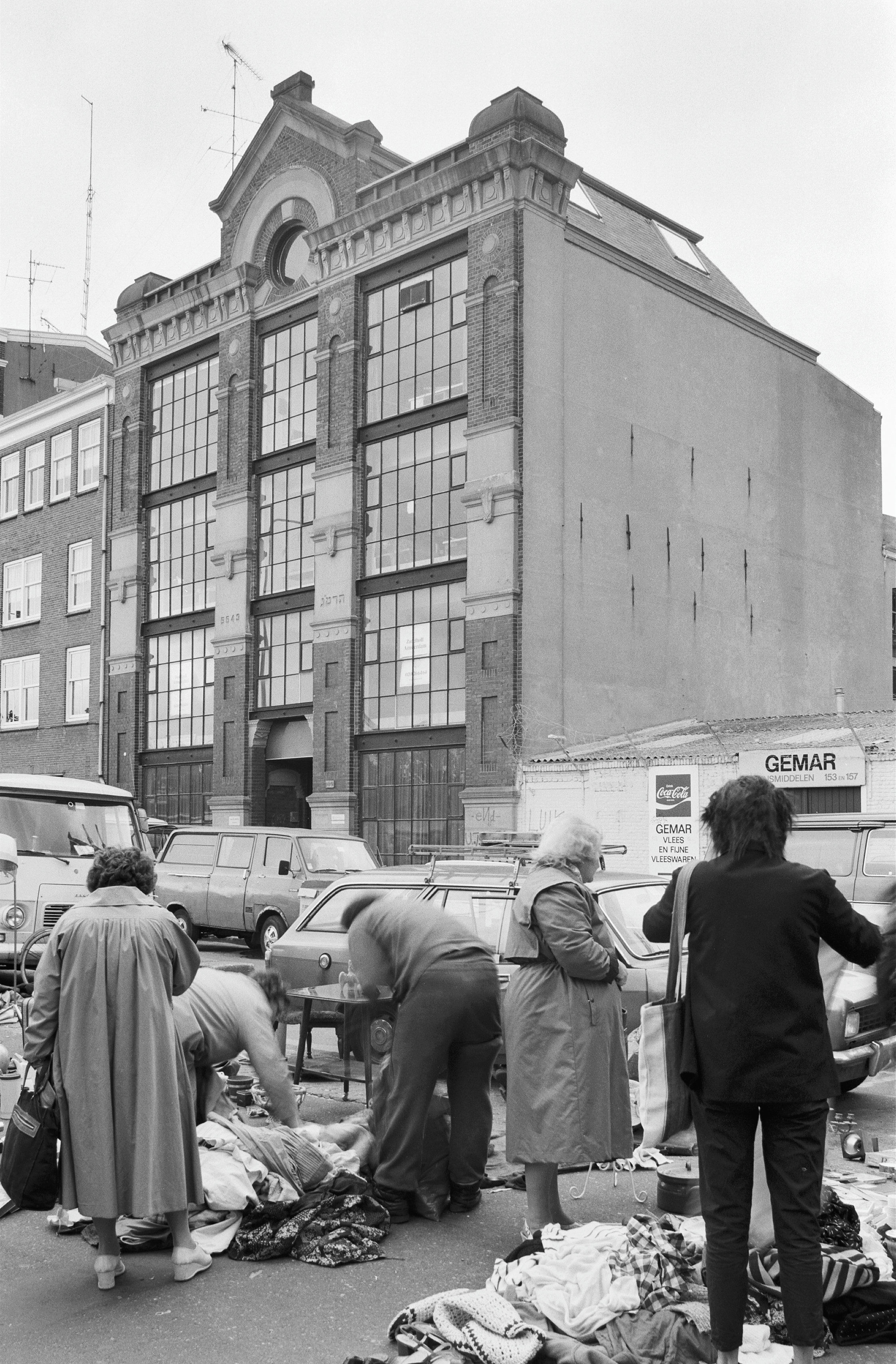 Synagoge: voorgevel